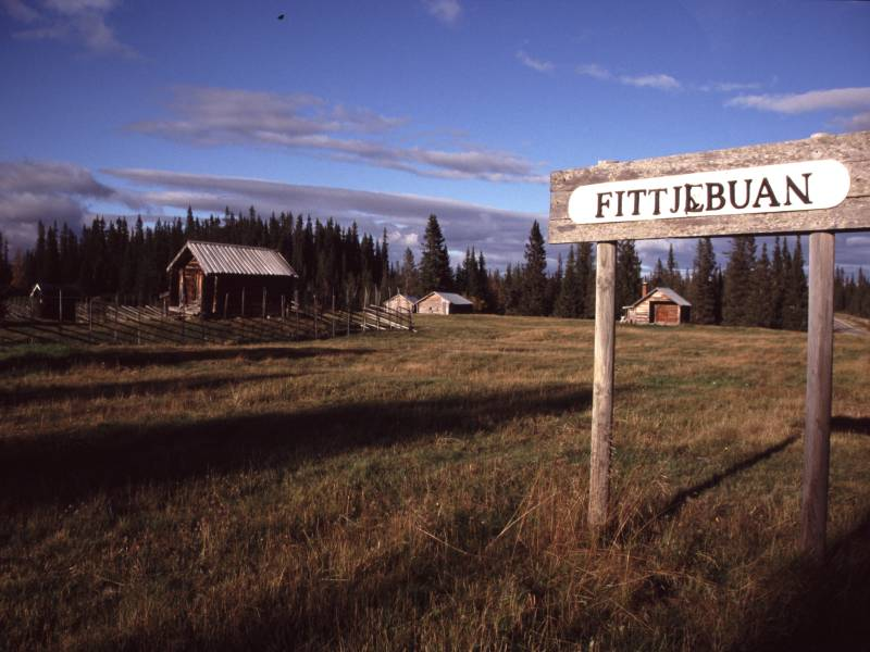 Die Alm Fittjebodarna am Fäbodvägen in Jämtland, Schweden; the mountain pasture Fittjebodarna along the Fäbodvägen in Jämtland, Sweden